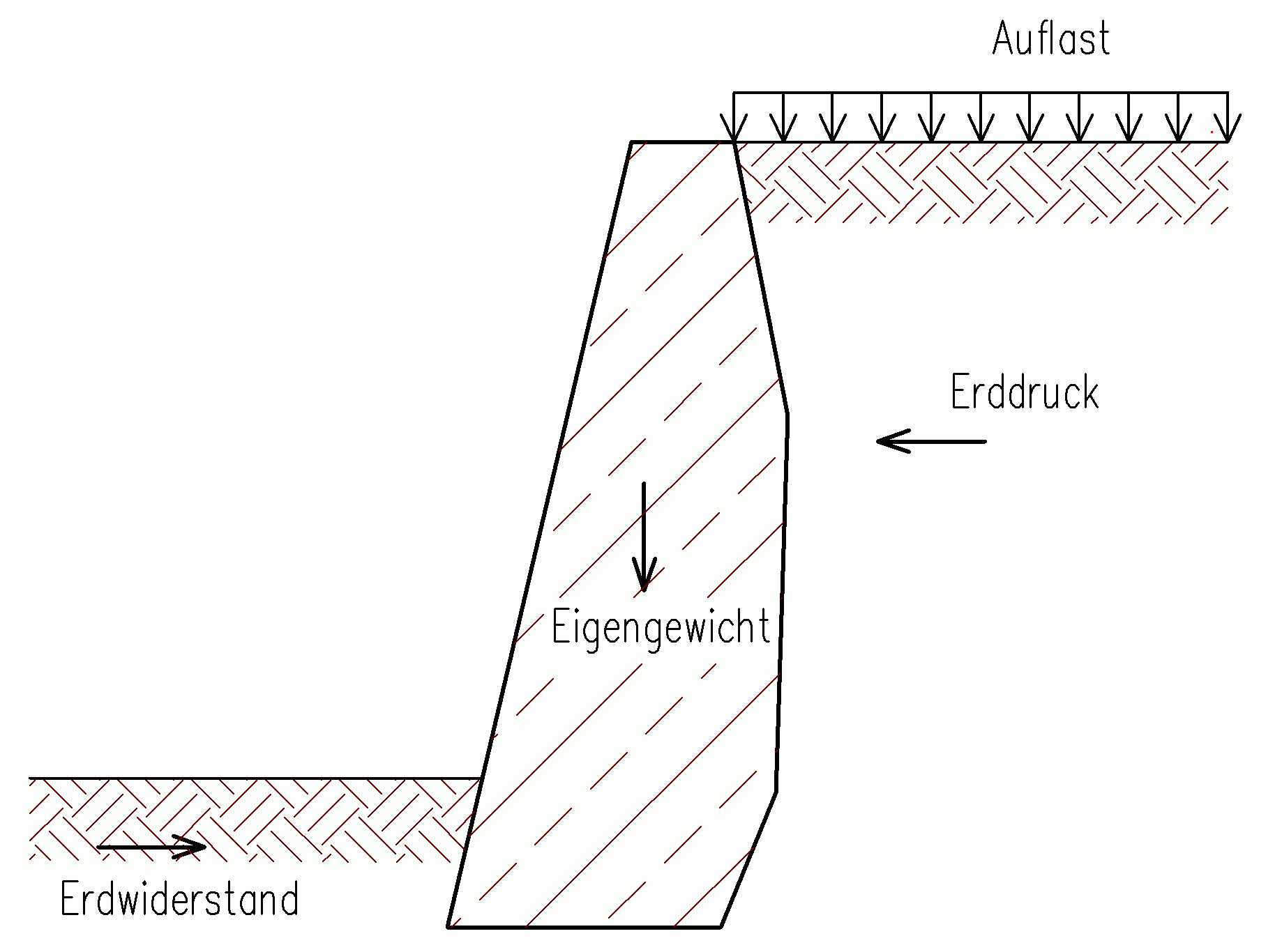 Schwergewichtswand